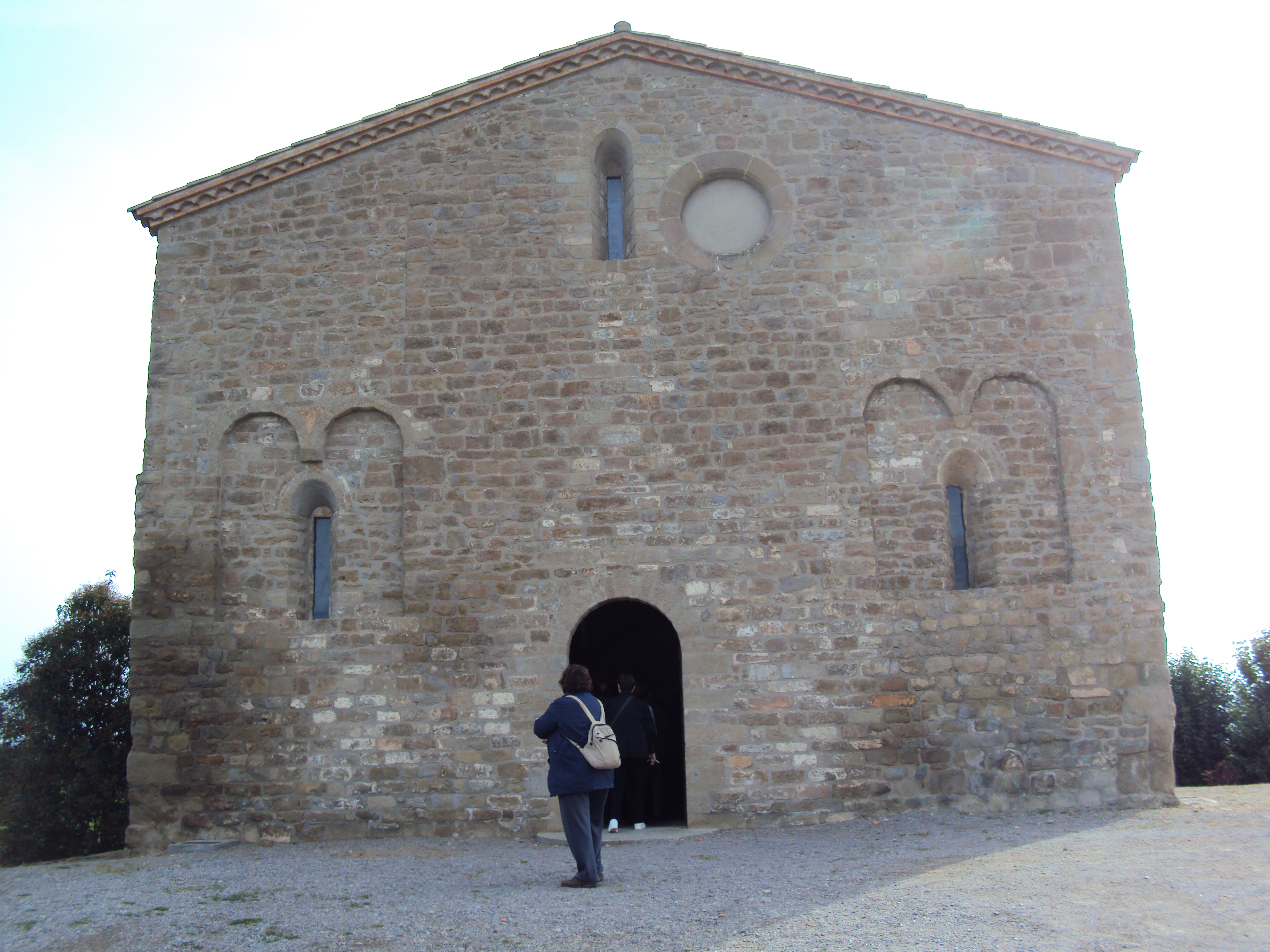 Església de Sant Pere (Viver i Serrateix)